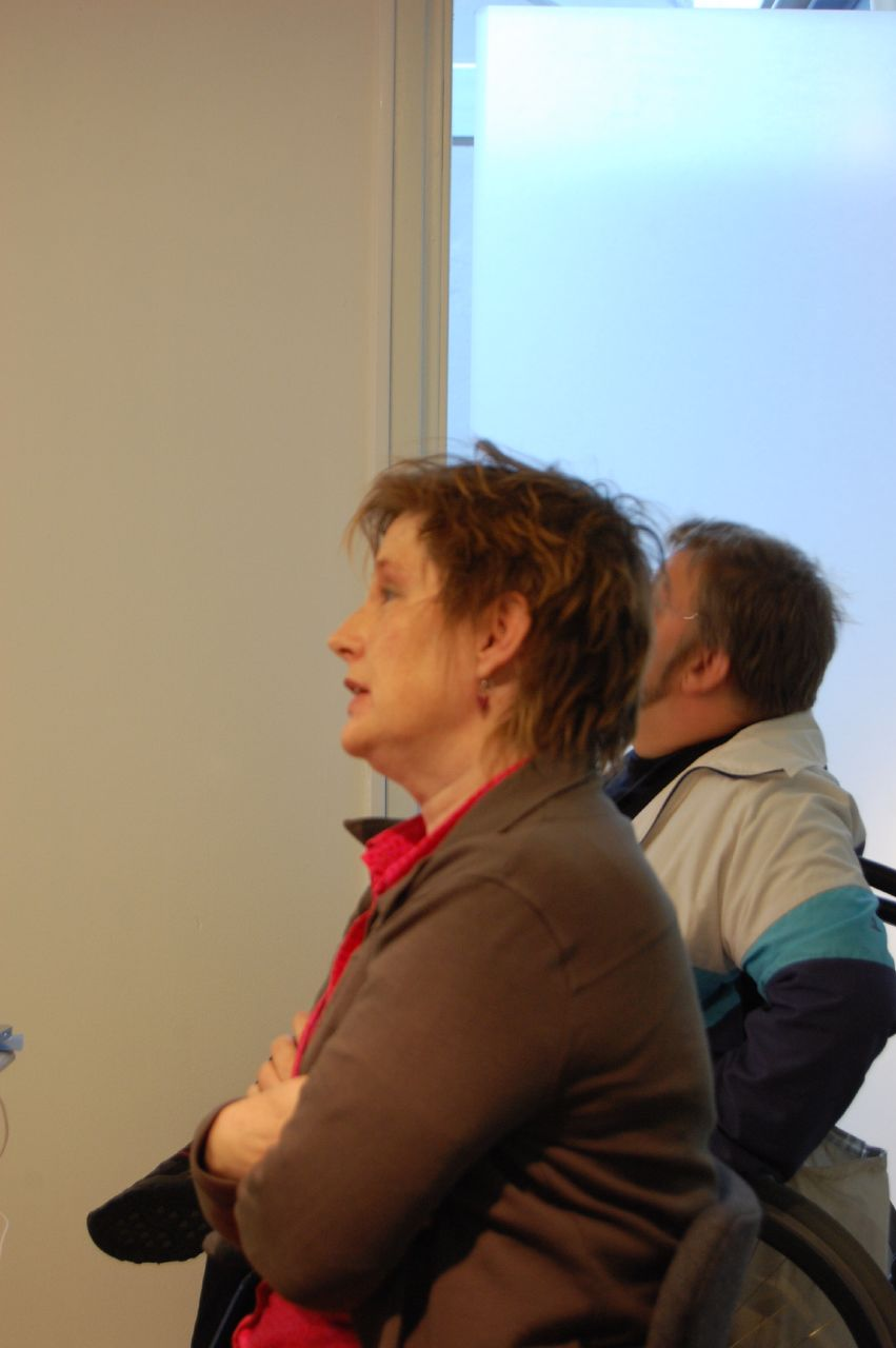 Anna Kettner föreläser under id-dagarna 2009. Anna Kettner, lecturing during a conference in 2009